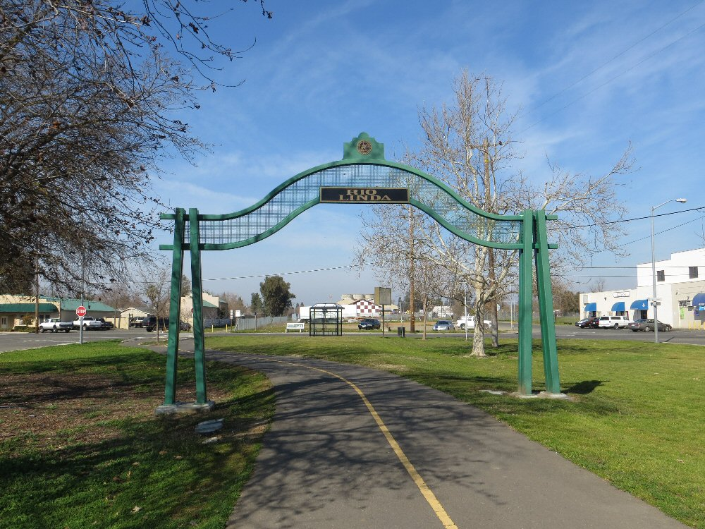 Rio Linda CA 1097